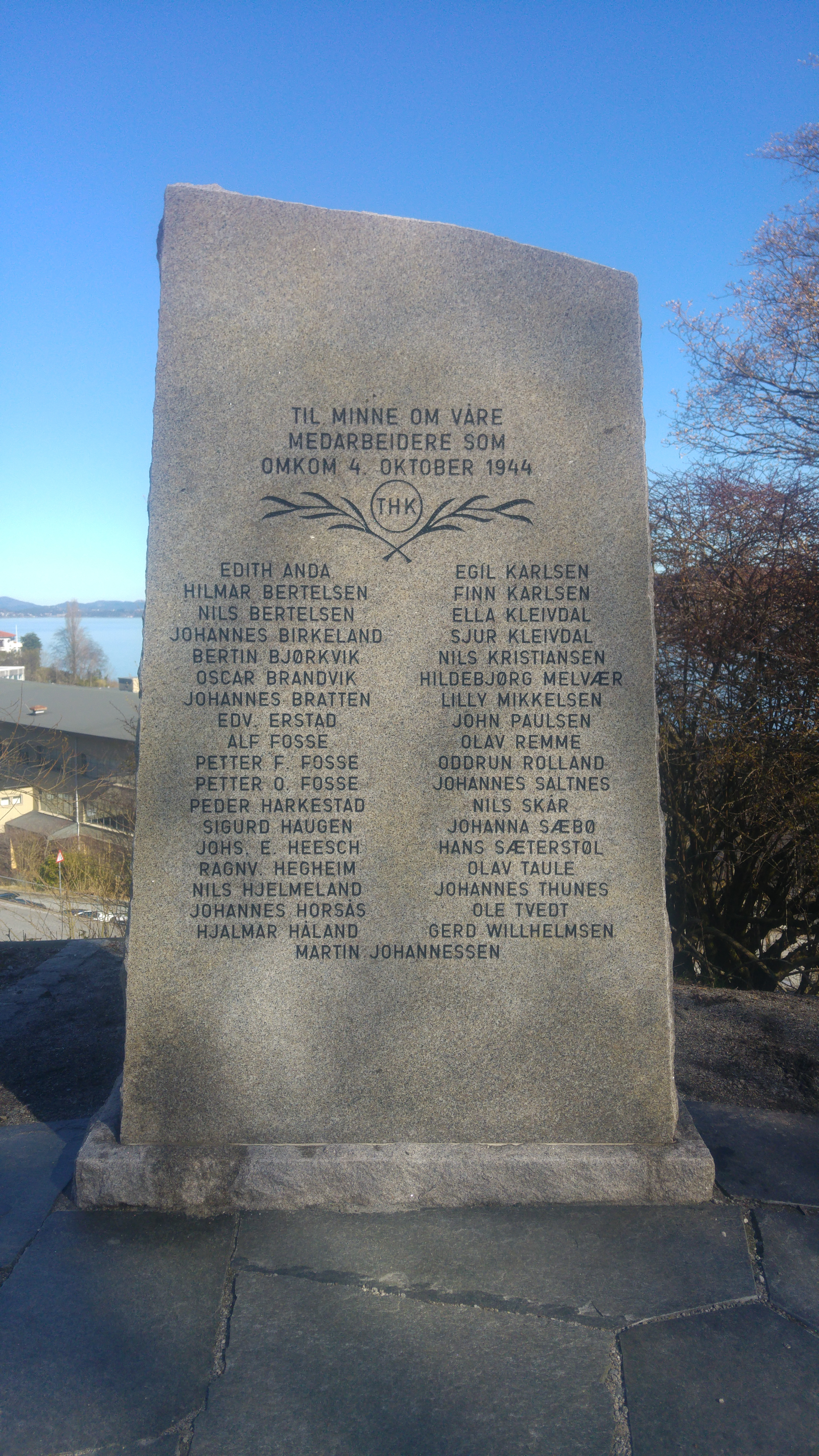 Minnestein over ansatte ved Kleivdal lærfabrikk som omkom under bombingen av Laksevåg 4. oktober 1944